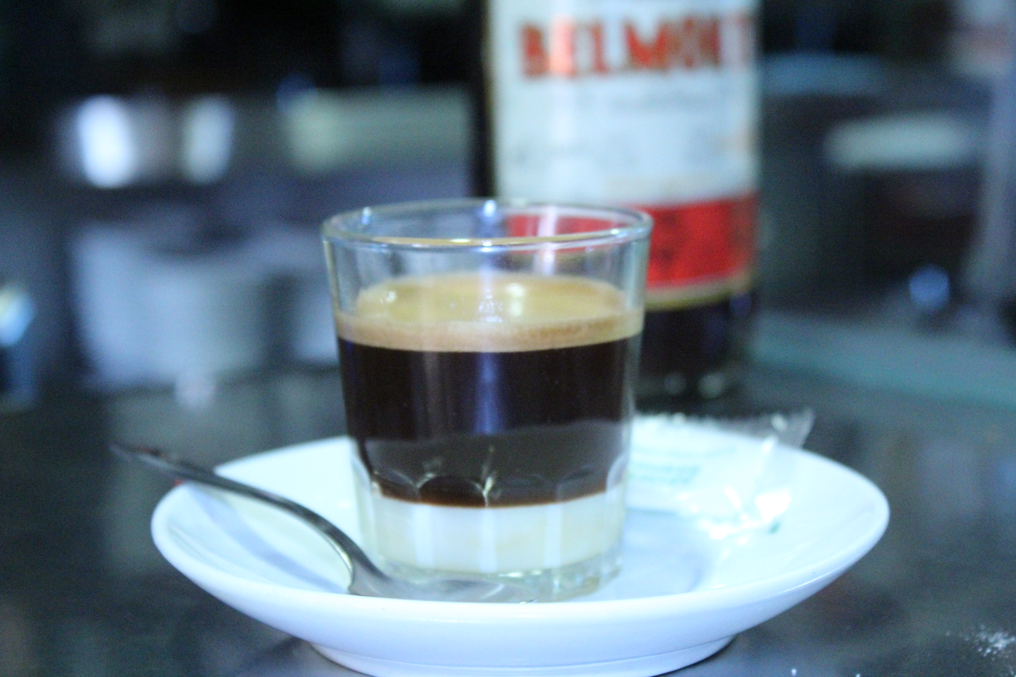 Imagen de un Belmonte en un bar de Alcantarilla, nótese que se sirve en vaso de cristal, con leche condensada y azúcar, fijarse en la cantidad de leche condensada, después añadir el Brandy al gusto.